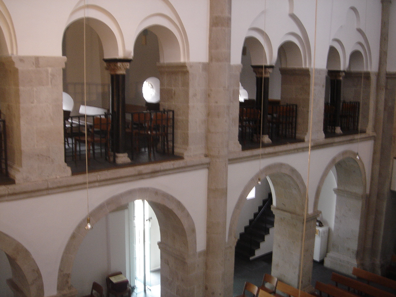 Reformationskirche Hilden, die rechte Empore.